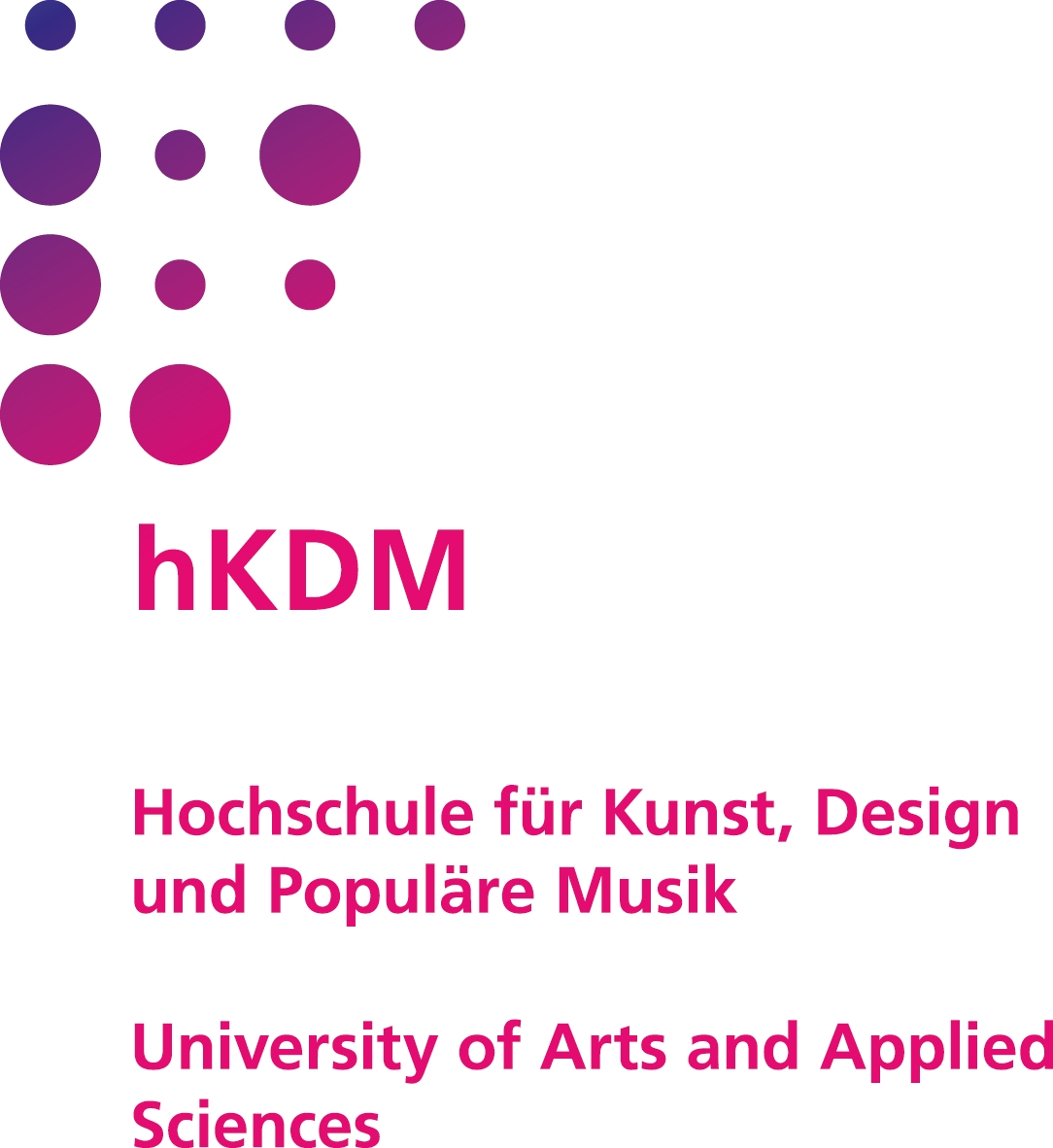 Das ist das Logo der Hochschule für Kunst, Design und Populäre Musik in Freiburg im Breisgau